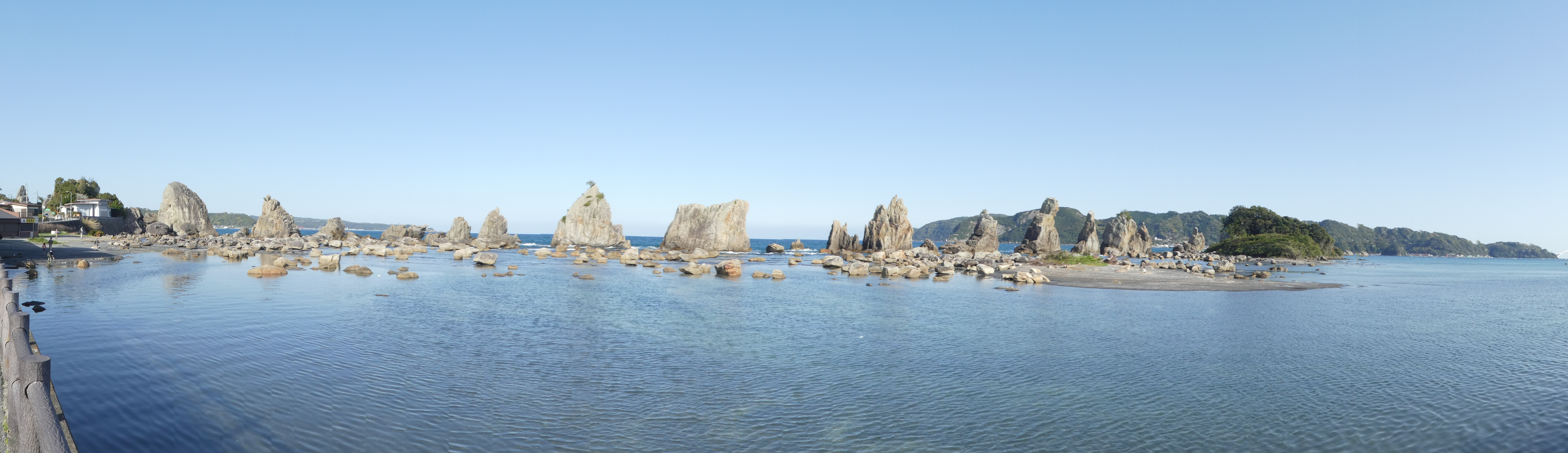 橋杭岩のパノラマ写真。道の駅くしもと橋杭岩にて撮影。